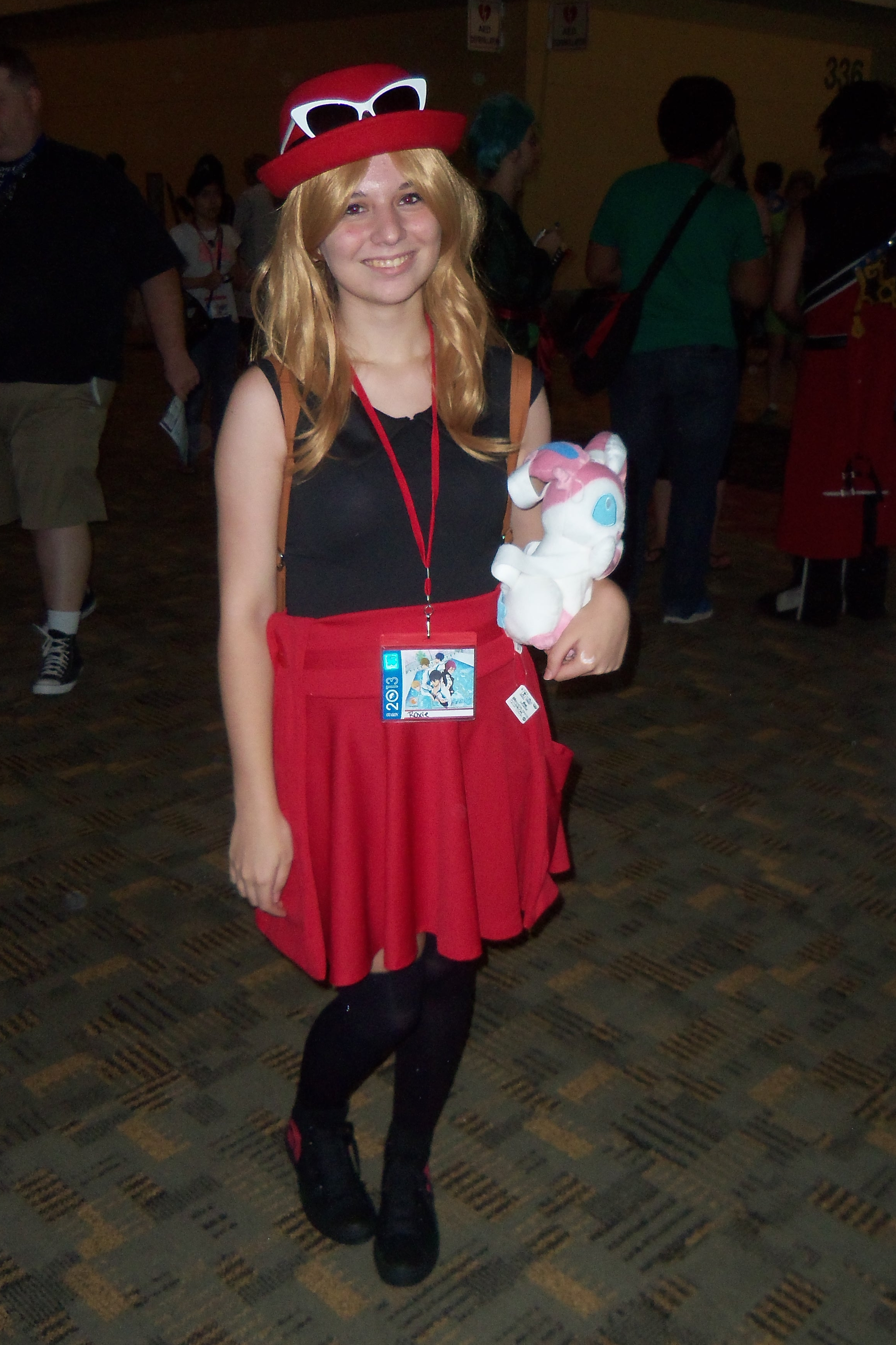 Serena from Pokemon XY. Cosplay de Serena de Pokémon X et Y.